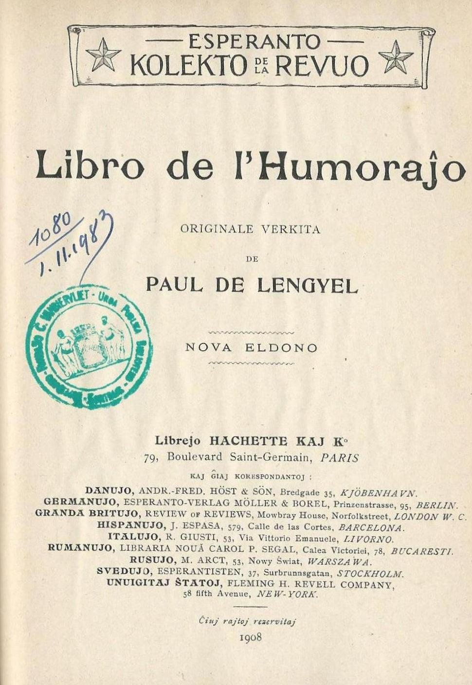 librokovrilo de libro "Libro de l'Humoraĵo", 1908